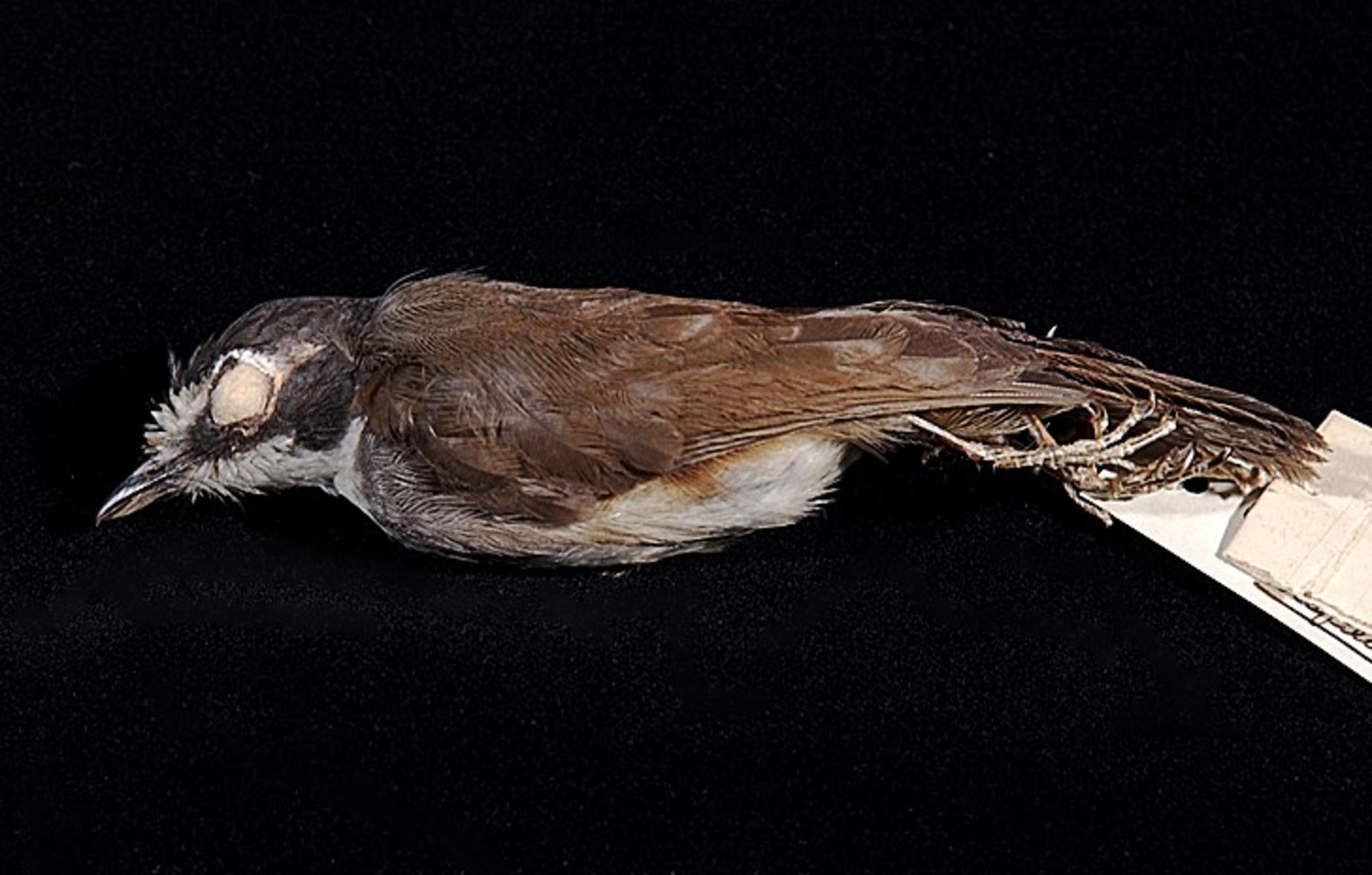 Malacopteron albogulare albogulare Blyth, 1844